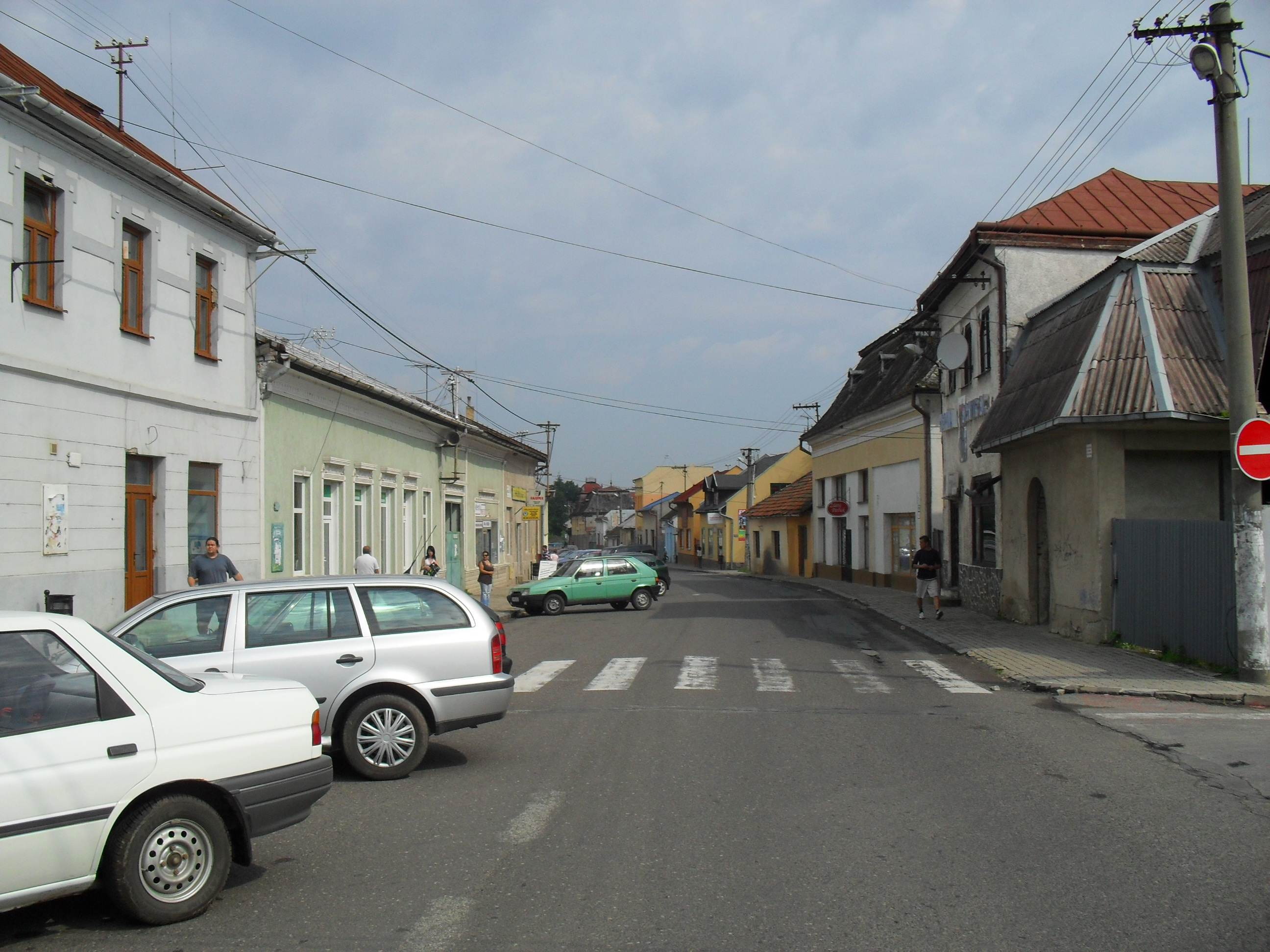 Királyhelmec - Fő utca